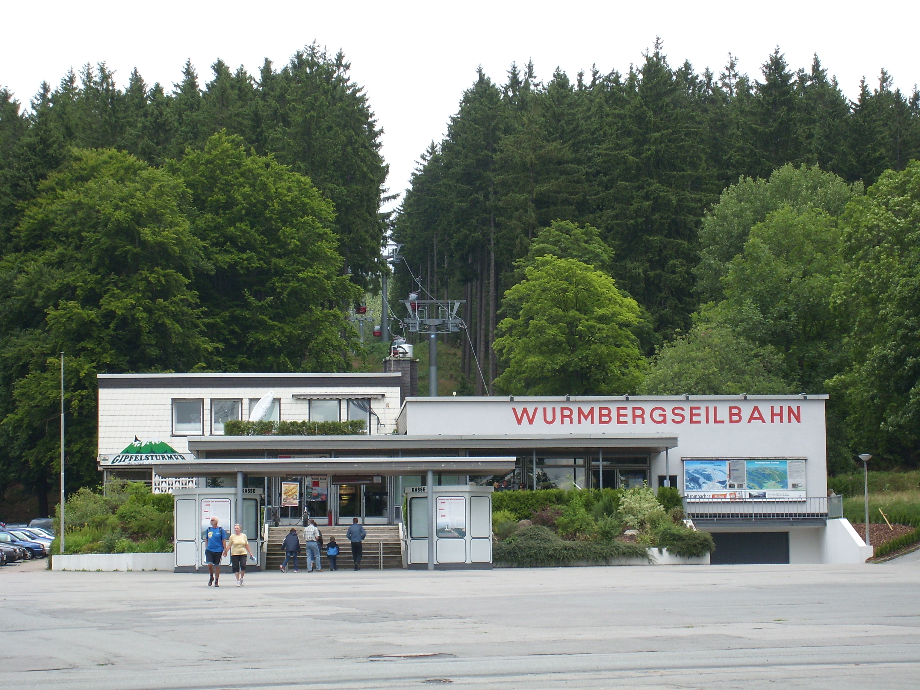 Talstation der Wurmbergseilbahn in Braunlage im Harz